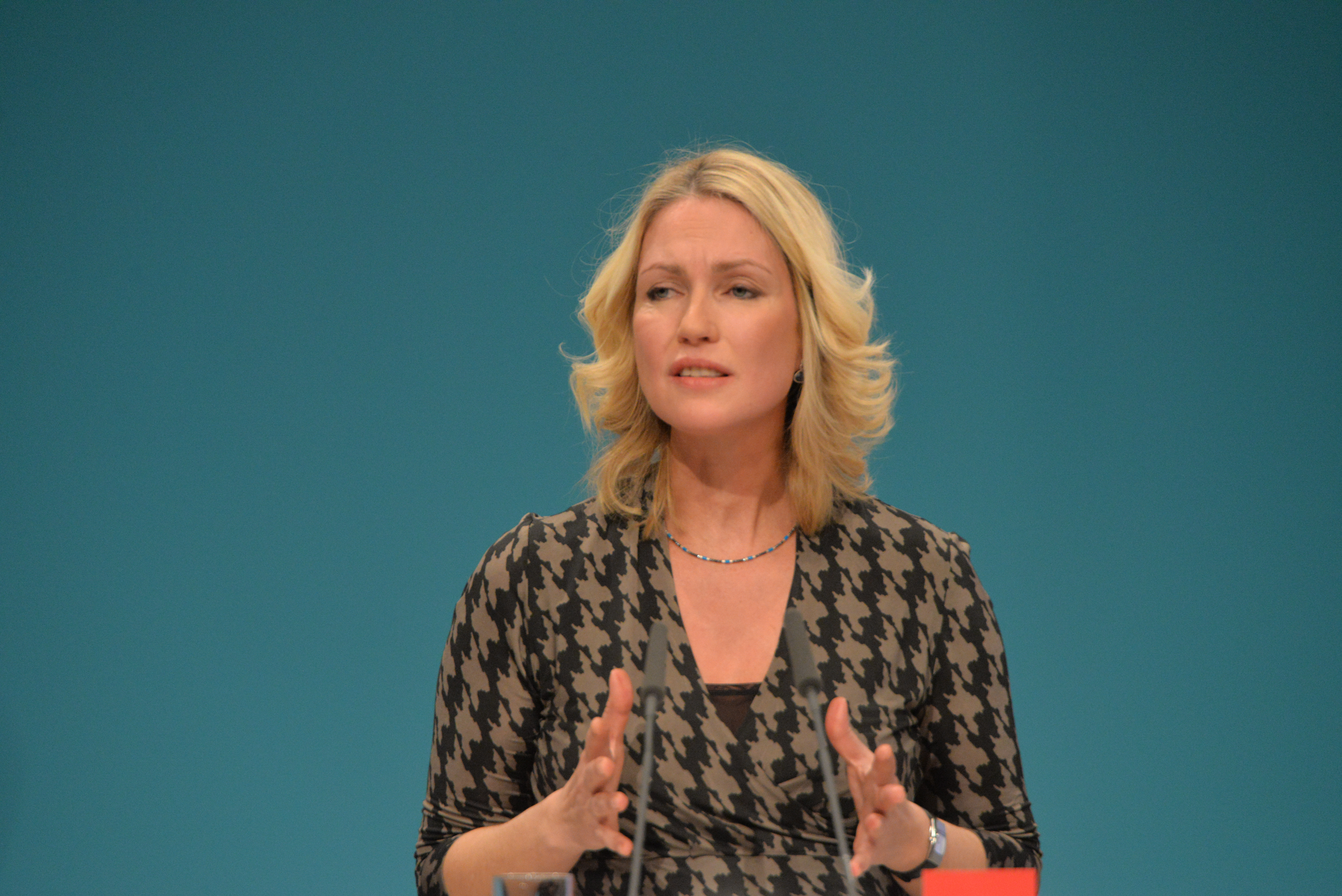 SPD Bundesparteitag Berlin, 10.-12. Dezember 2015, CityCube, Messe Berlin